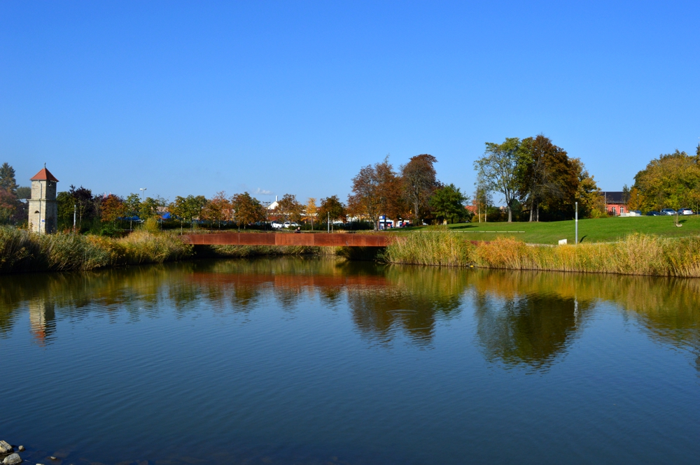 Der Stadtsee liegt im Zentrum der Stadt Staßfurt. Er ist im Rahmen der Internationalen Bauausstellung 2010 entstanden.